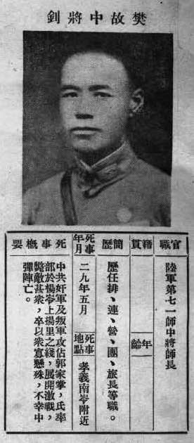 中文（台灣）: 抗戰軍人忠烈錄第一輯中的烈士遺像